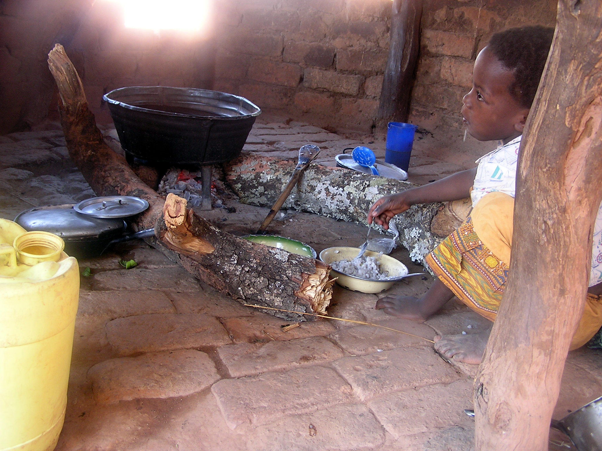 Vaření na biomase